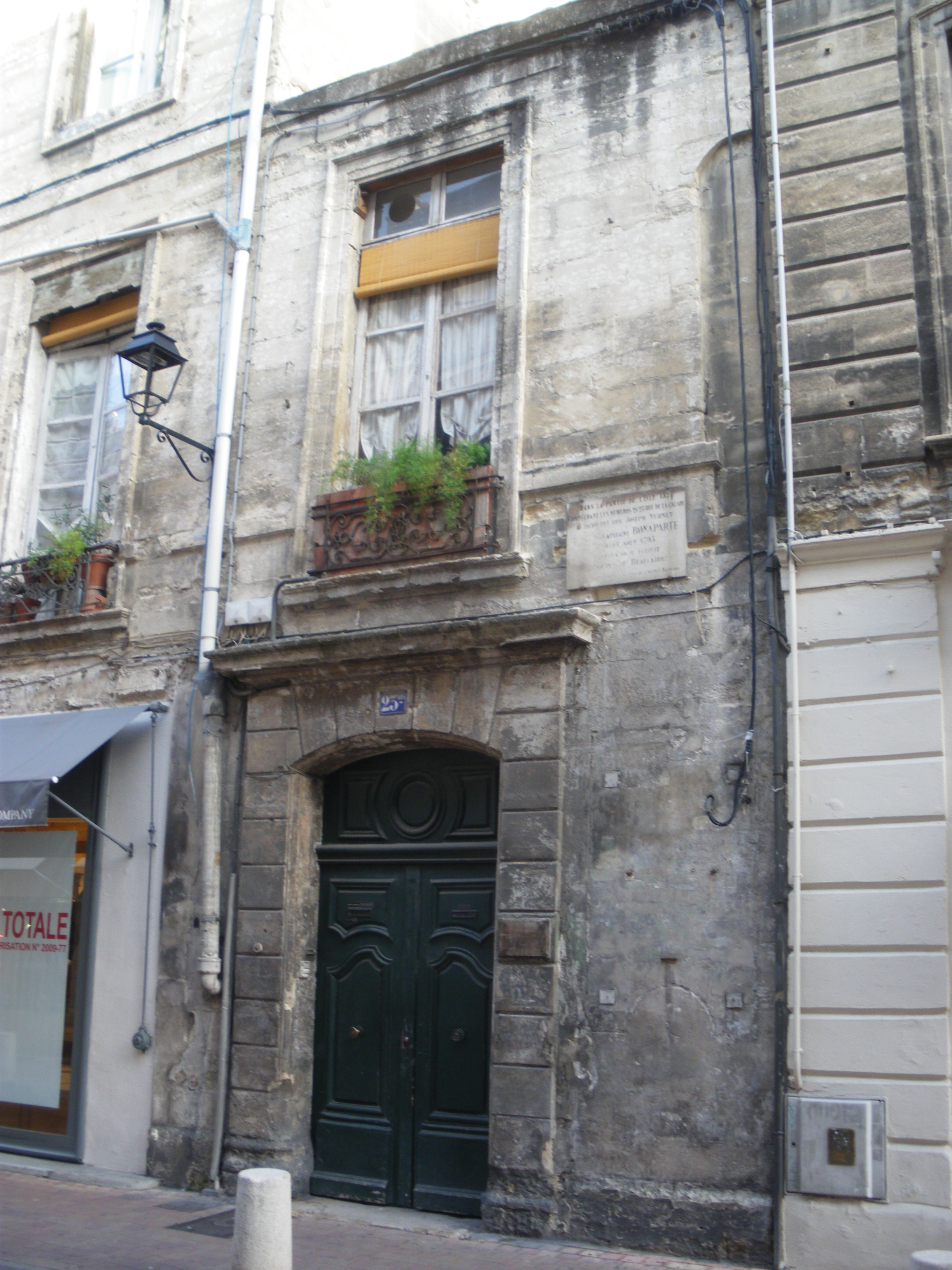 Maison Bouchet à Avignon, ou vécut le Capitaine Bonapart, en juillet aout 1793